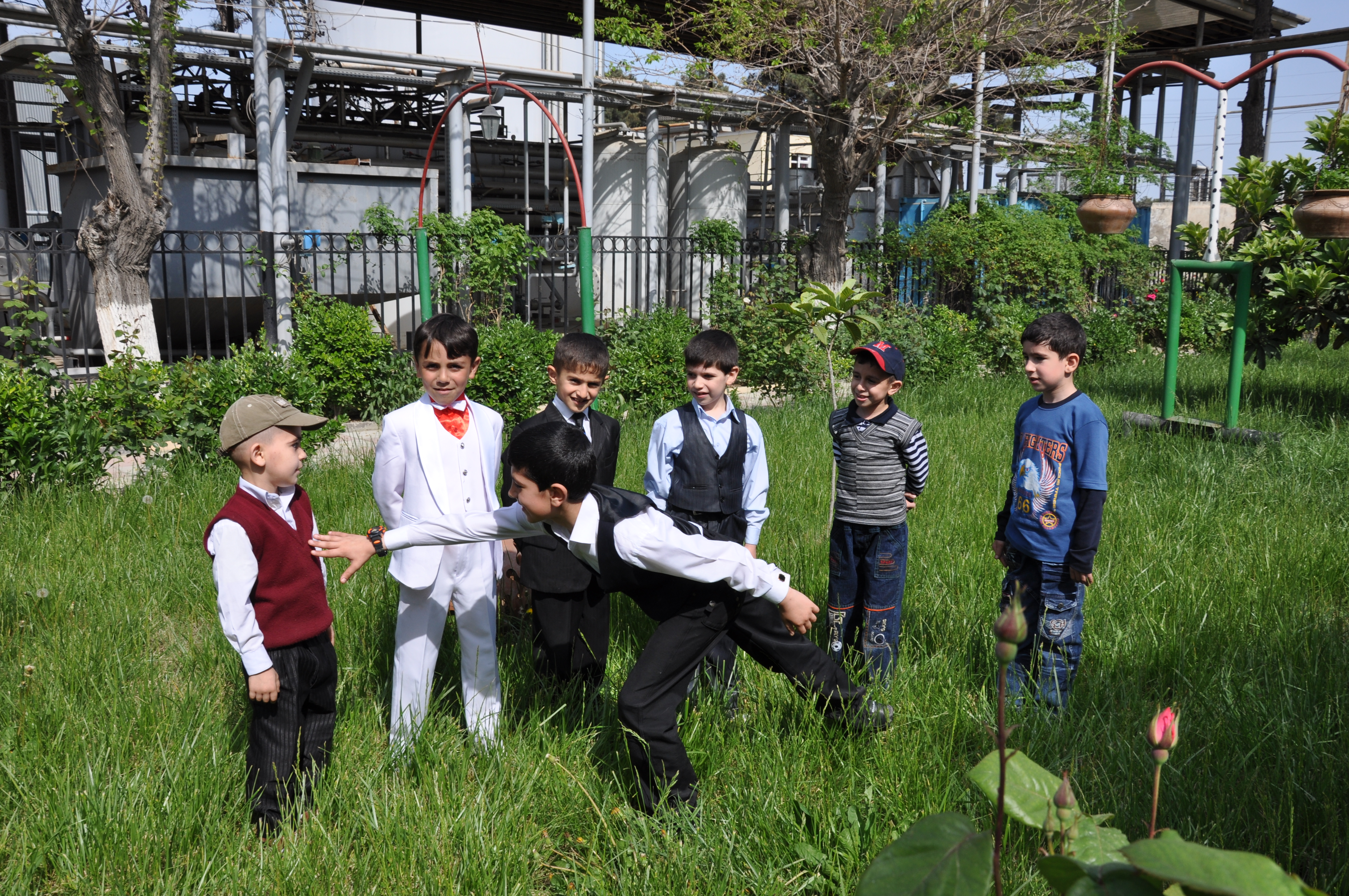 Sanama — Azərbaycanda uşaq və gənclər arasında yazqabağı günlərdə, şənlik və bayramlarda dəstələrə bölünmədən oynanılan oyunlarda "başçı"("aparıcı" və ya "işçi") seçmək üçün başlanğıc forma.